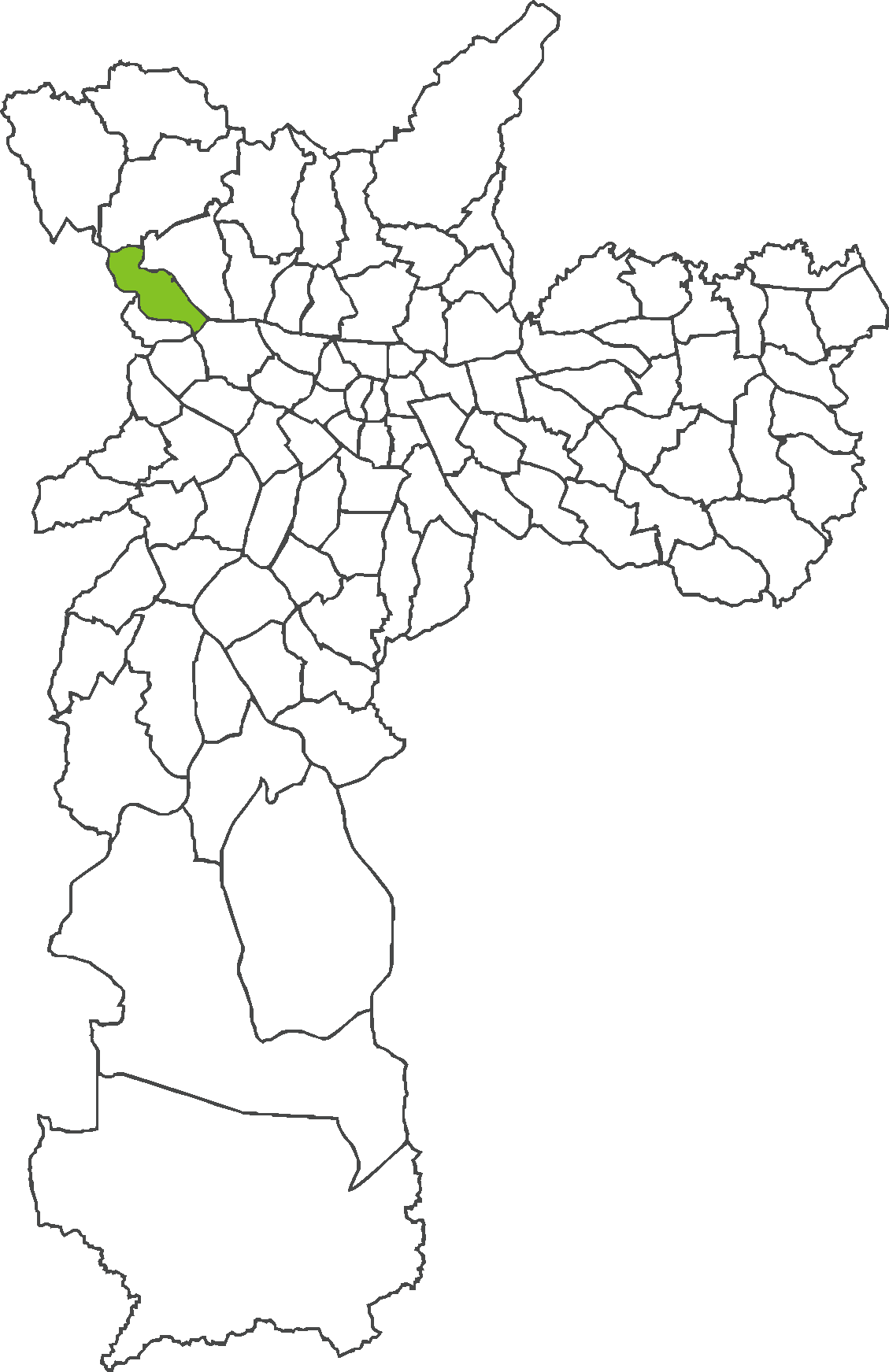 Localização do distrito de São Domingos no município de São Paulo.